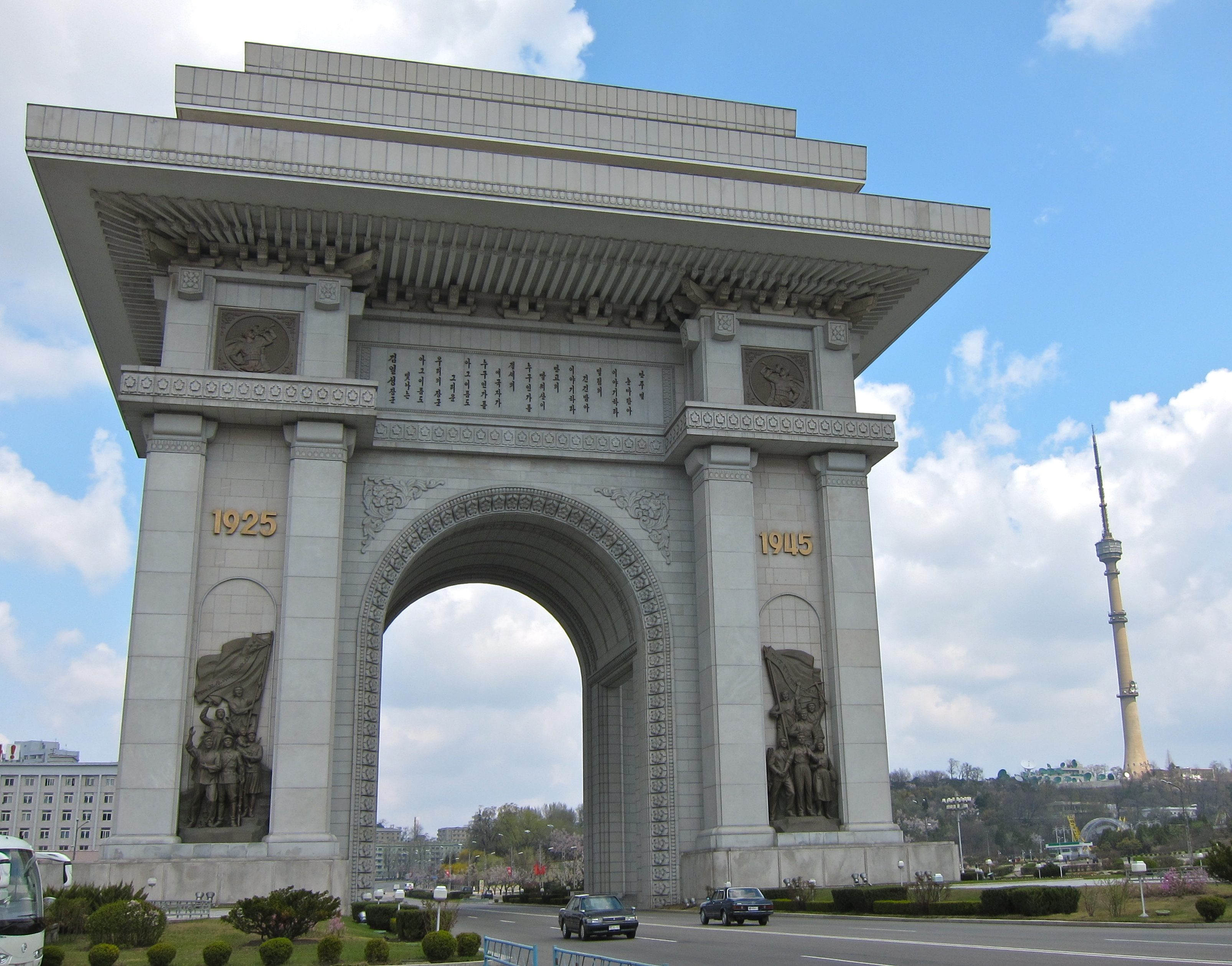 Pyongyang, DPRK (North Korea)